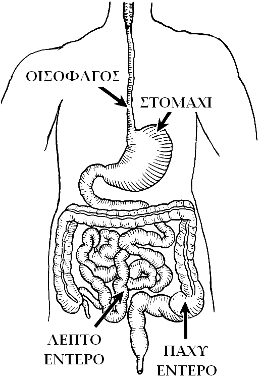 το Έντερο.